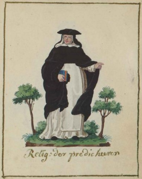 Antwerpse predikheer op het einde van de 18e eeuw